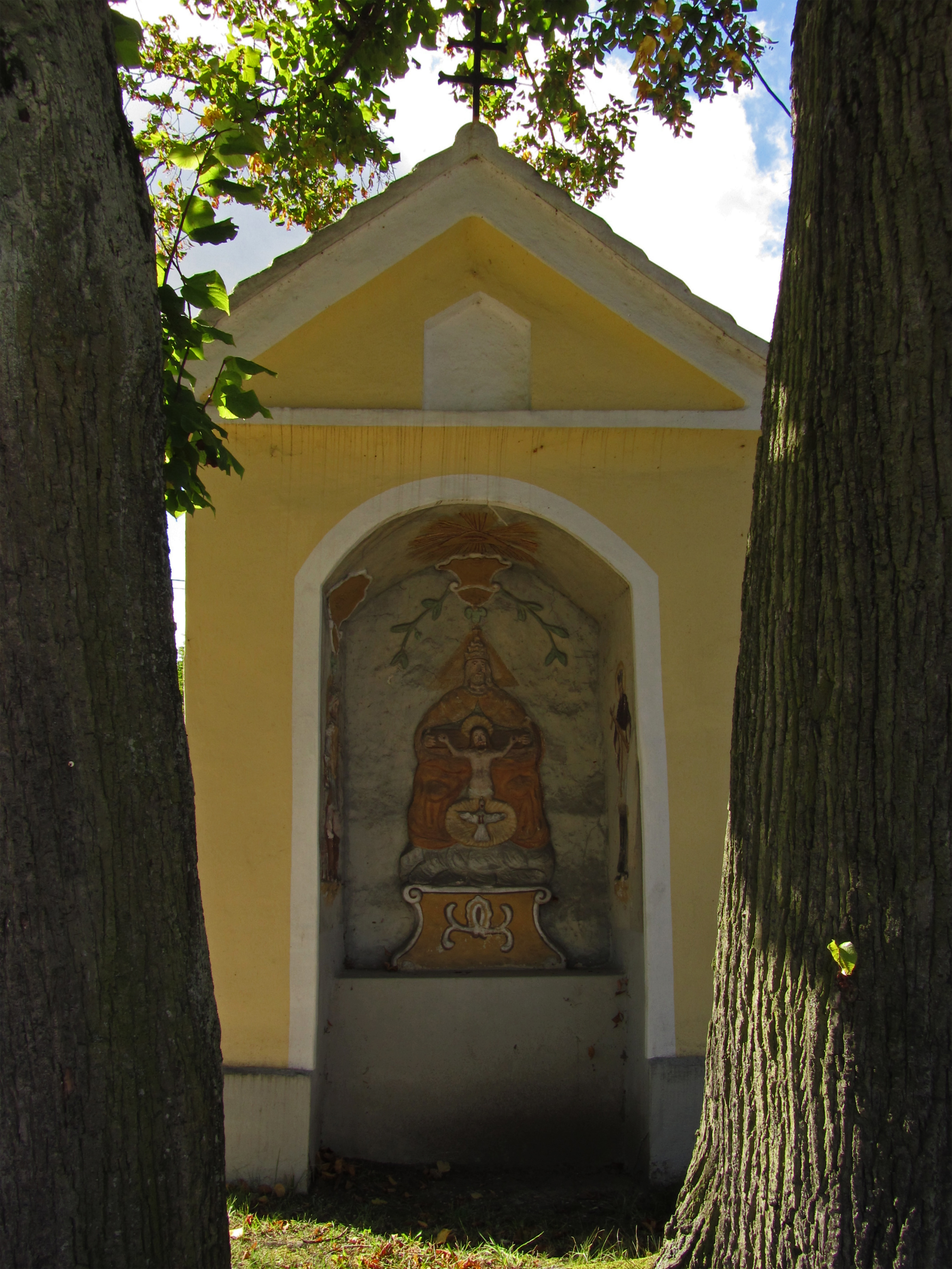 Barocke Wegkapelle, wahrscheinlich aus der ersten Hälfte des 18. Jahrhunderts.